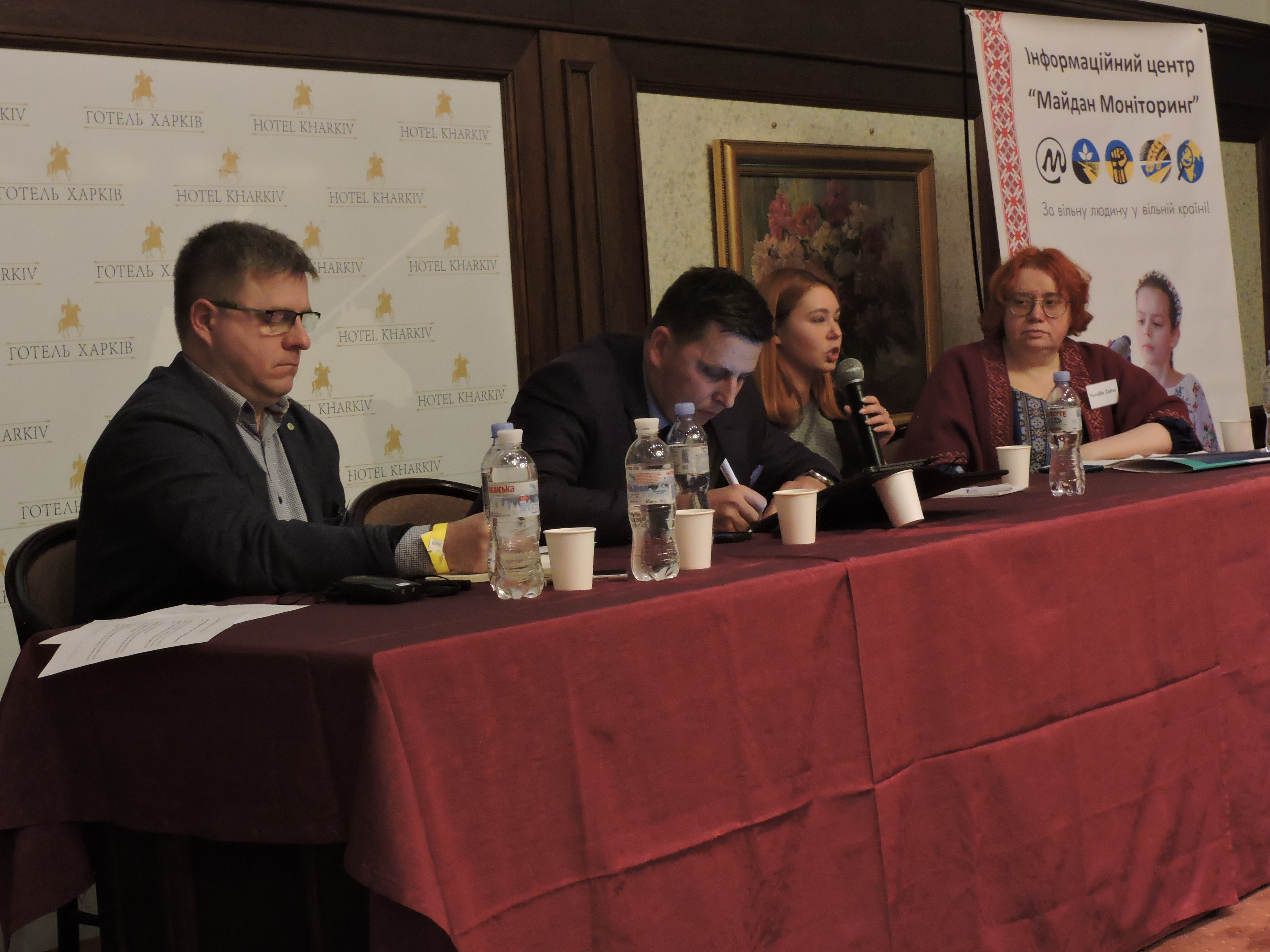 Другий Харківський Міжнародний Безпековий Форум. м. Харків, 29—30 листопада 2019 року.День перший. Міжнародна панель. Друга частина. Учасники: Влад Кобєц (Польща / Білорусь) – виконавчий директор, The International Strategic Action Network for Security Петр Пойман (Чехія) – кримінолог, експерт з безпеки, організованої злочинності і аналізу нових методів гібридної війни, засновник Team 4 Ukraine. Олександра Цехановська (Київ) – старший аналітик Групи з аналізу гібридних загроз Українського кризового медіа центру Наталія Зубар, Голова правління Інформаційного центру «Майдан Моніторинг», модератор.